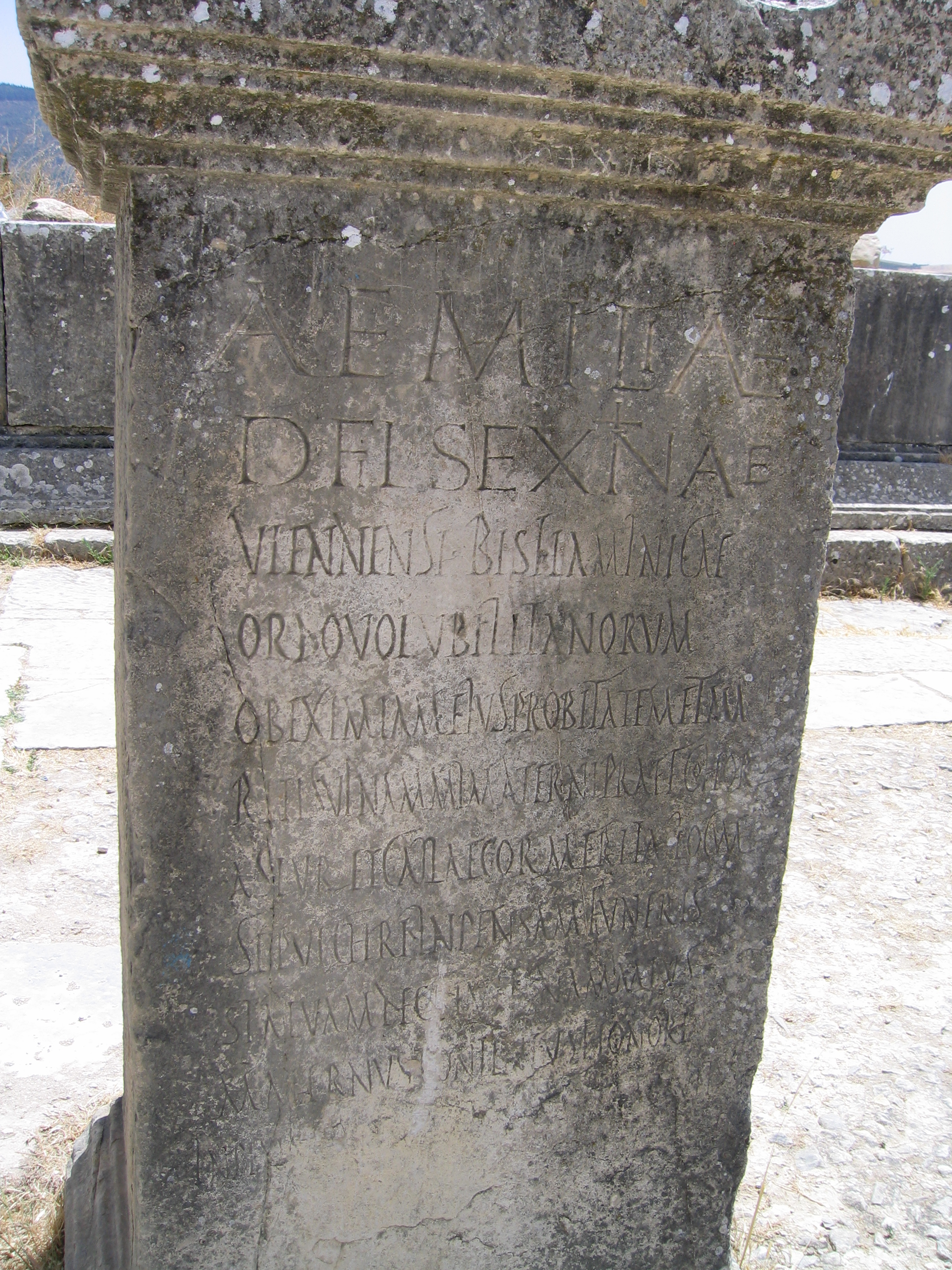 socle à Volubilis